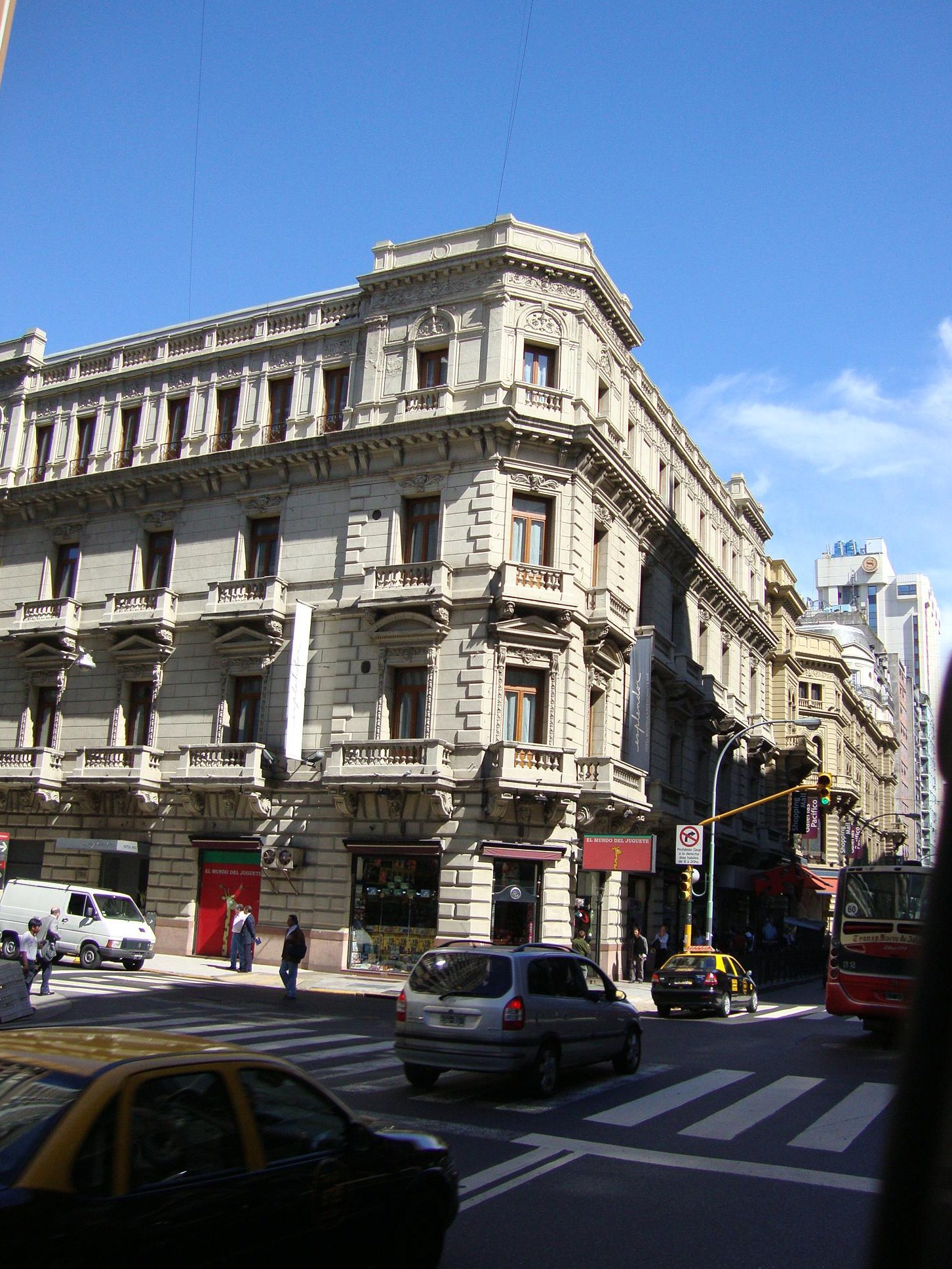 Hotel Esplendor Buenos Aires, antiguo Phoenix.